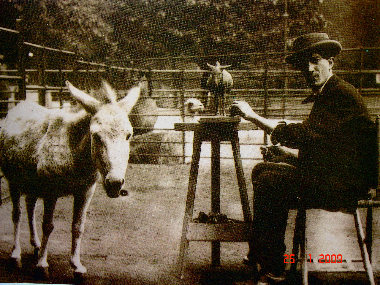 le sculpteur italien Rembrandt Bugatti (1884-1916) en train de modeler l'âne sauvage (ou hémione), au zoo d'Anvers